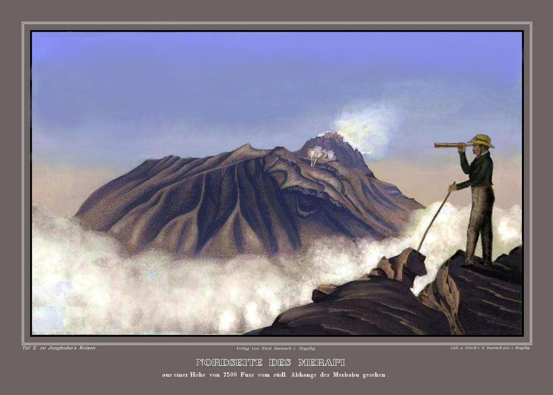 Merapi von der Nordseite